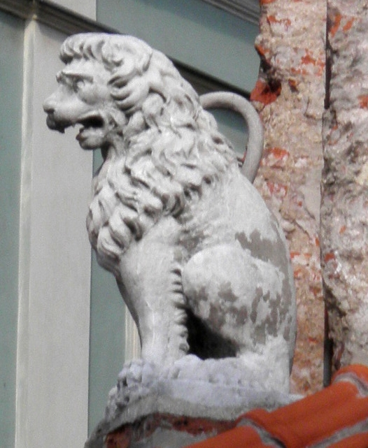 Kamienica przy Rynku 9 (tzw. Kamienica Pod Lwami) na Starym Mieście w Lublinie - lew po lewej stronie fasady